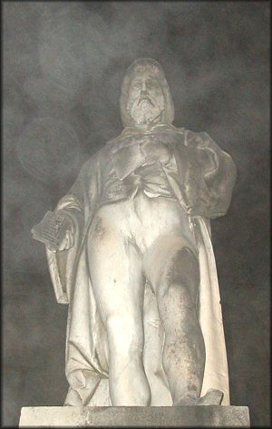 Feltre, statua di Panfilo Castaldi, situata in Piazza Maggiore